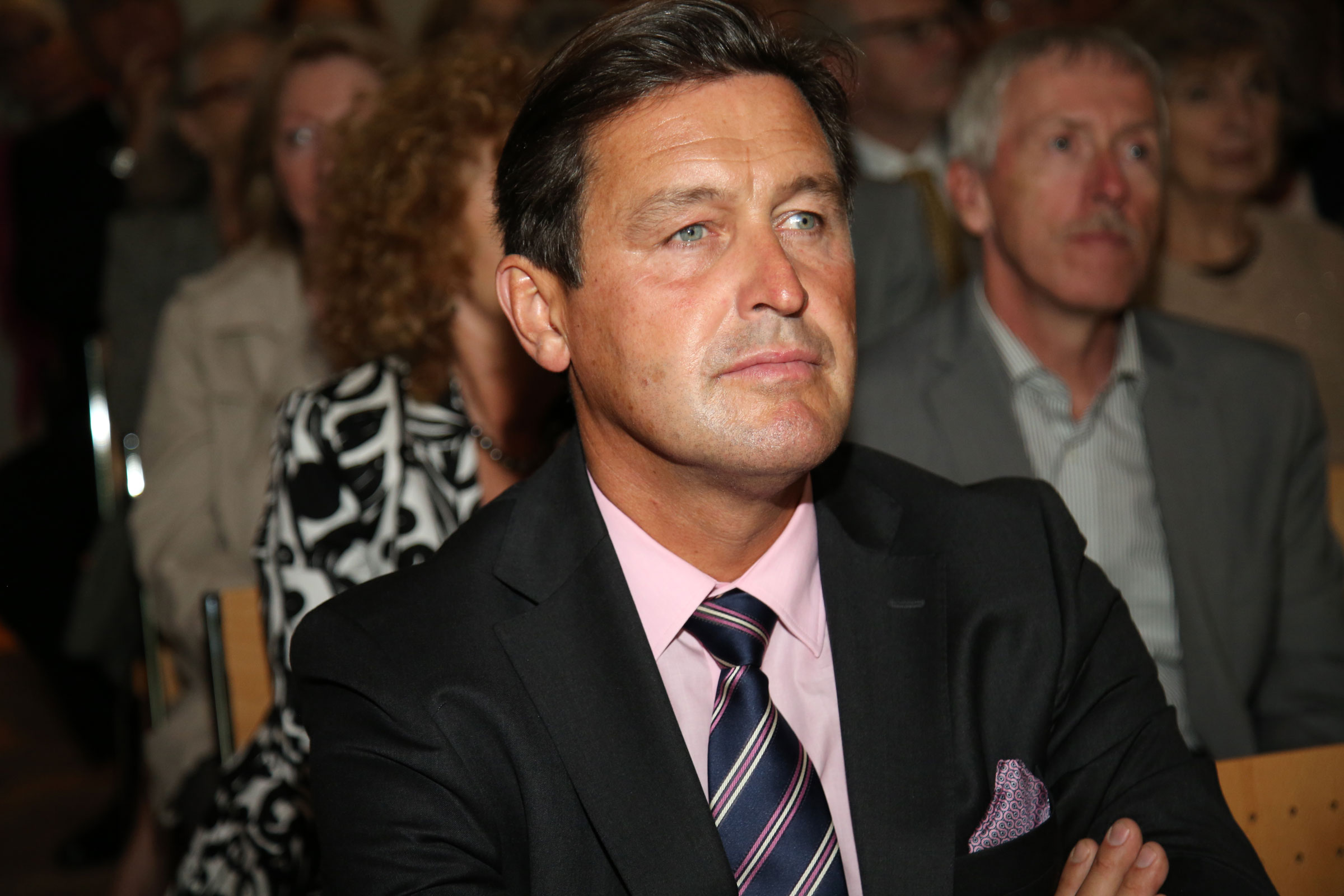 Peter Hanke, Chef der Wien-Holding